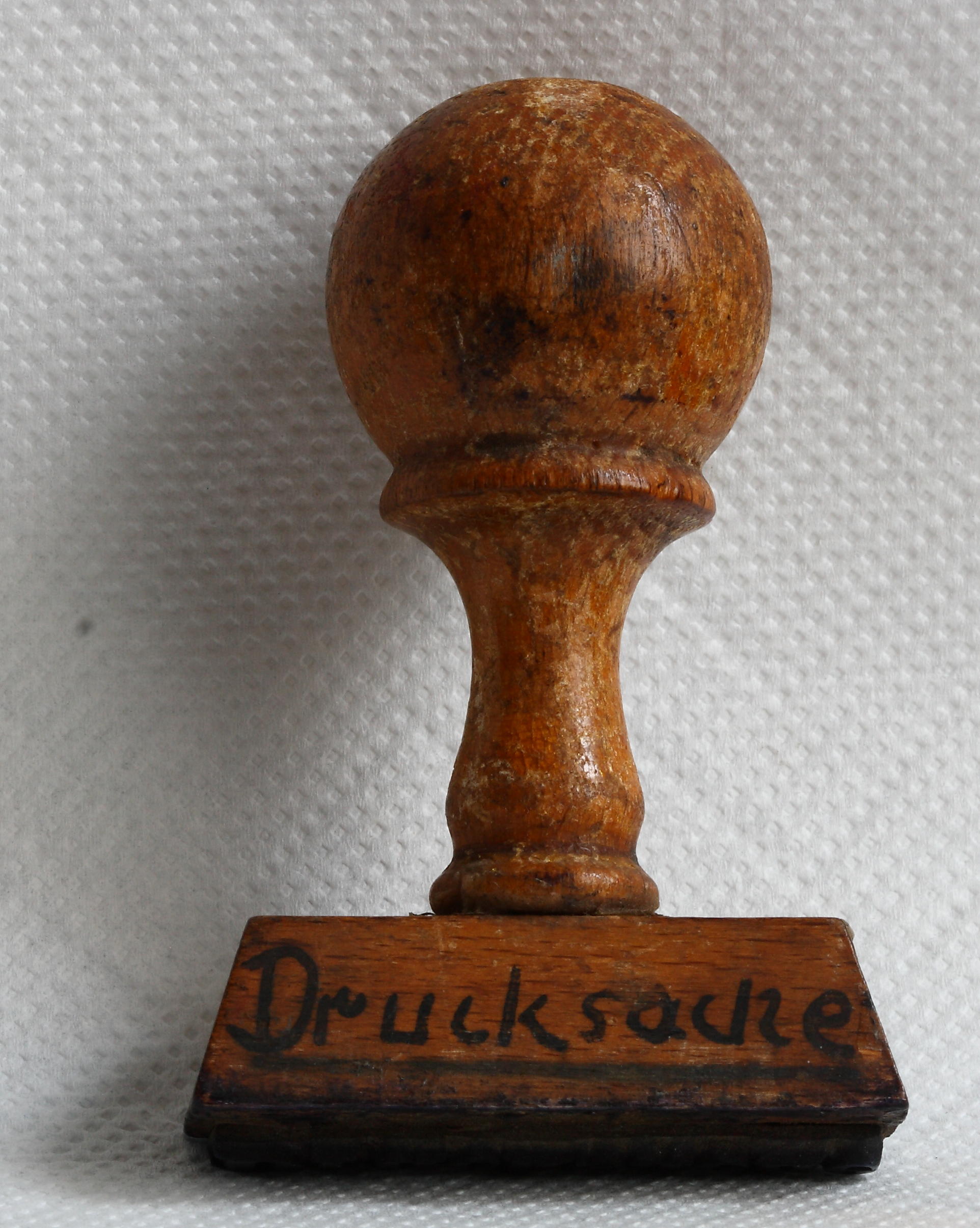 Historischer_Bürostempel,_Aufschrift_-_Drucksache